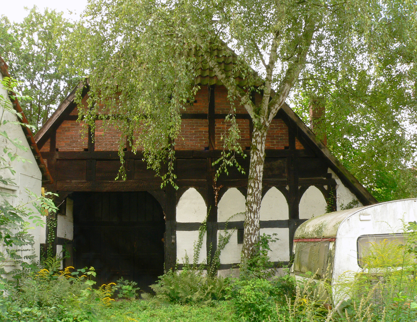 Köritzhof, Hauptgiebel des Hallenhauses